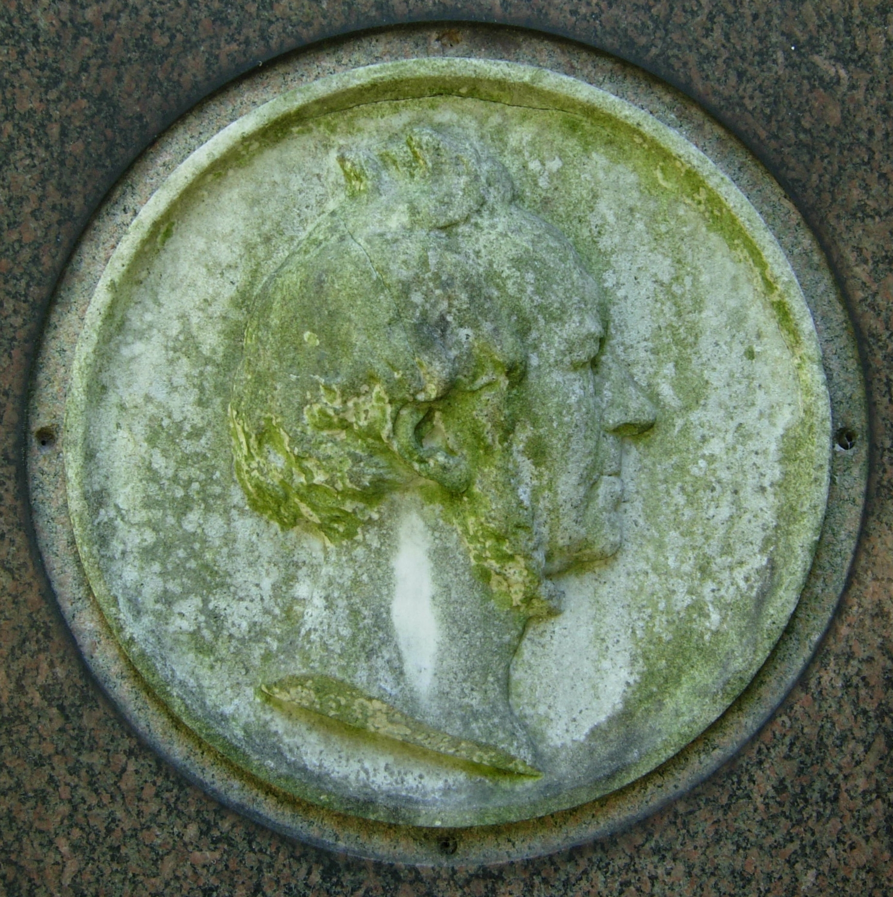 Albert Küppers: Marmor-Medaillon (1884) für den Althistoriker Arnold Schäfer (1819–1883) auf dem Alten Friedhof Bonn; der Grabstein enthält das Todesdatum 20.11.1883 (nicht den 19.11. wie im o.a. Lemma); der Stein (und damit die Signatur) ist stark erodiert, vermutlich auch wegen der fehlenden Umringung, deren Bohrlöcher gut erkennbar sind; dass Küppers das Medaillon geschaffen hat, geht aus dem Aufsatz des Stadtbaurats von Noël in den Rheinischen Geschichtsblättern (8. Jahrgang, Nr. 10, 1907) hervor